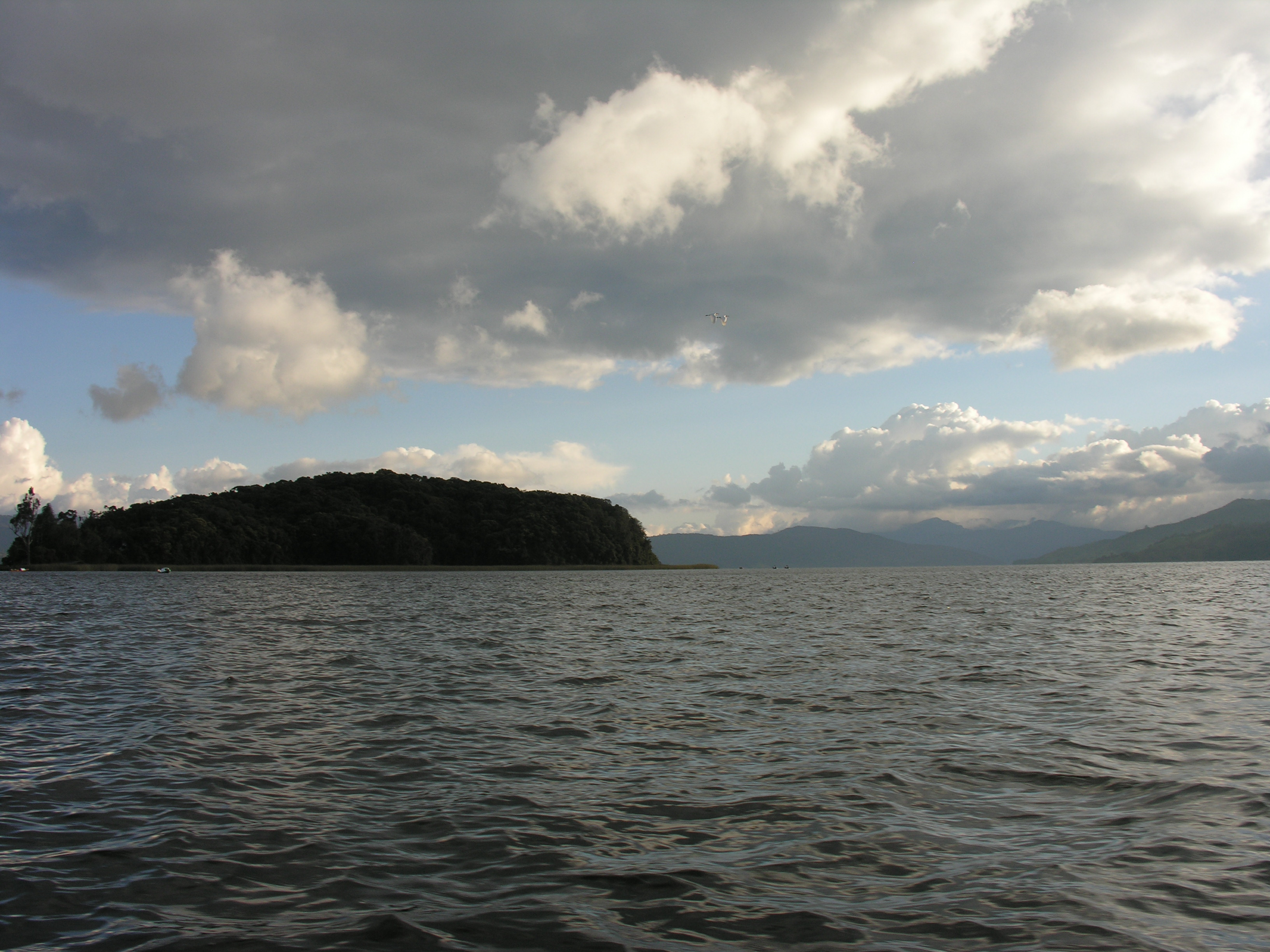 Laguna de La Cocha - Pasto - Colombia, Foto: José Camilo Martínez S.